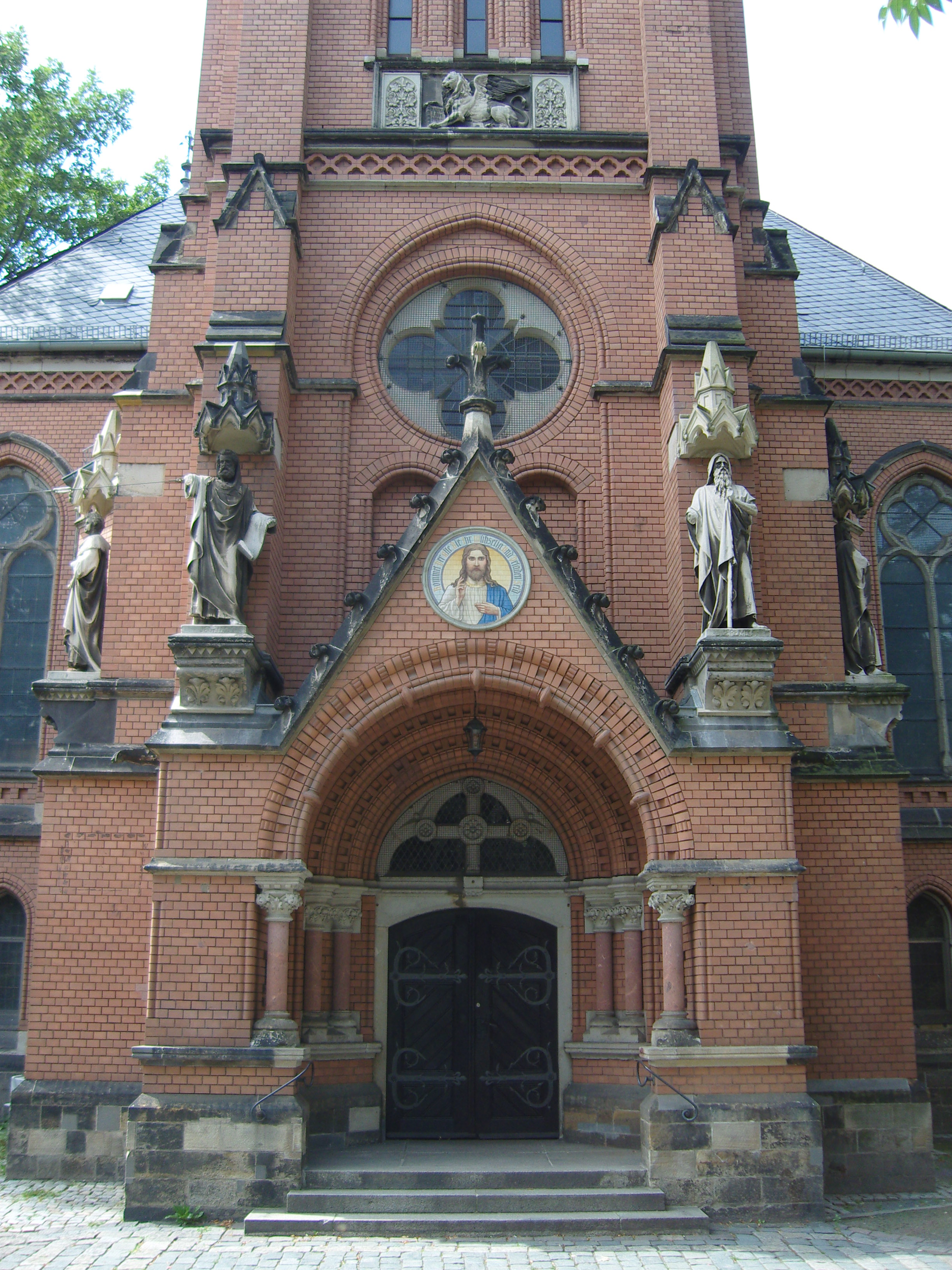 Eingangsportal der Markuskirche in Dresden-Pieschen, die Figuren über dem Portal wurden von Robert Henze geschaffen